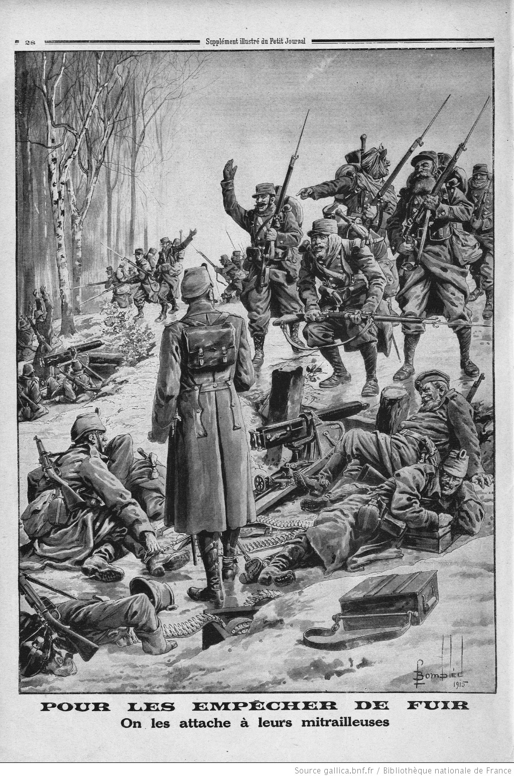 14 2 15 pour les empêcher de fuit on les attacha à leurs mitralleuses